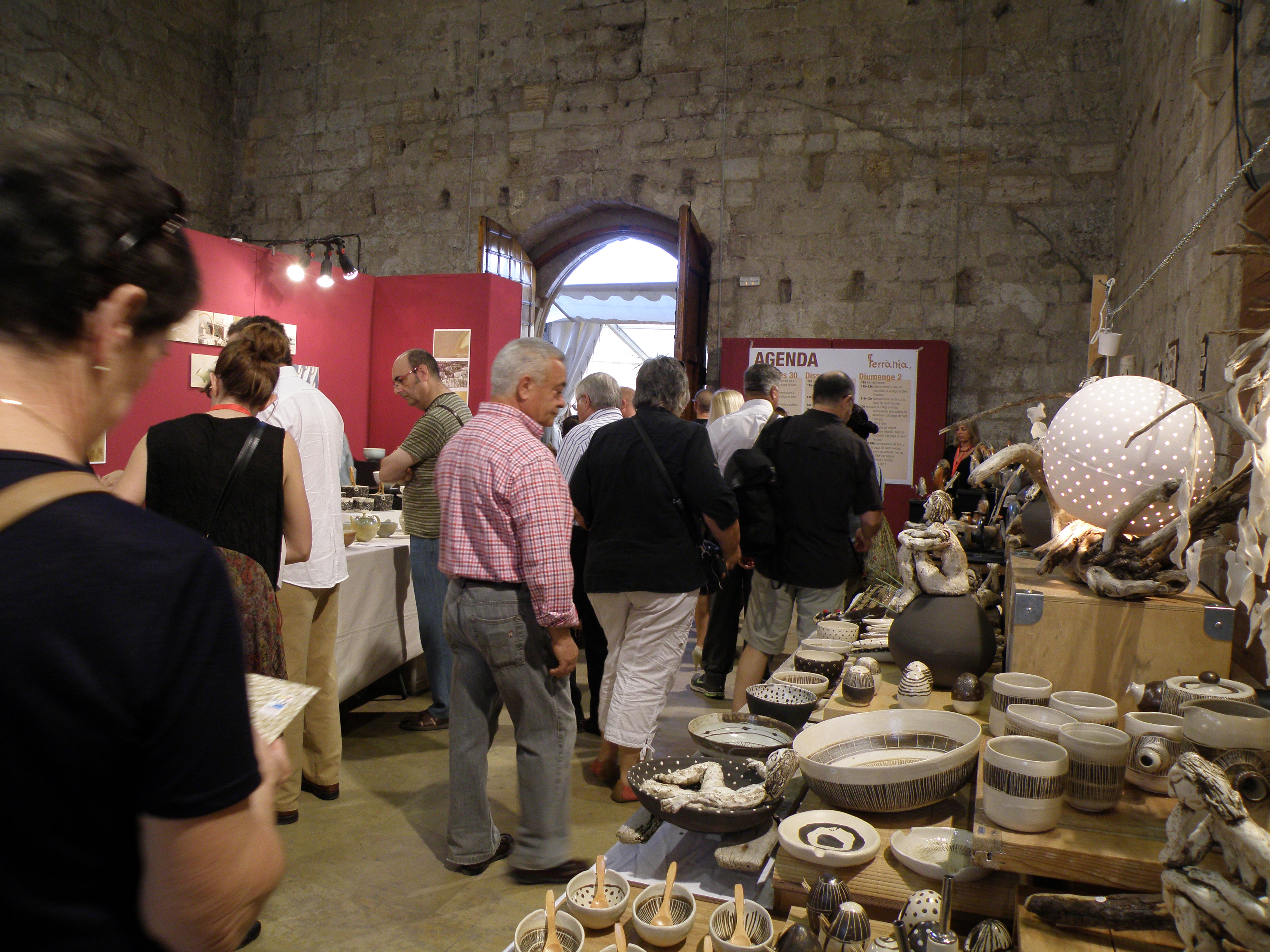 Vista de Terrània 2011, fira de la ceràmica de Montblanc, Conca de Barberà, Tarragona. Exposició i venda de l'obra de diversos artistes dins de l'antiga església de Sant Francesc.